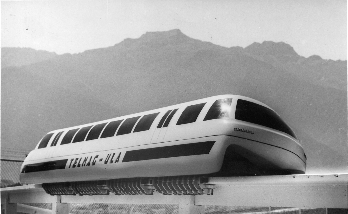 Prototipo 6 del TELMAGV